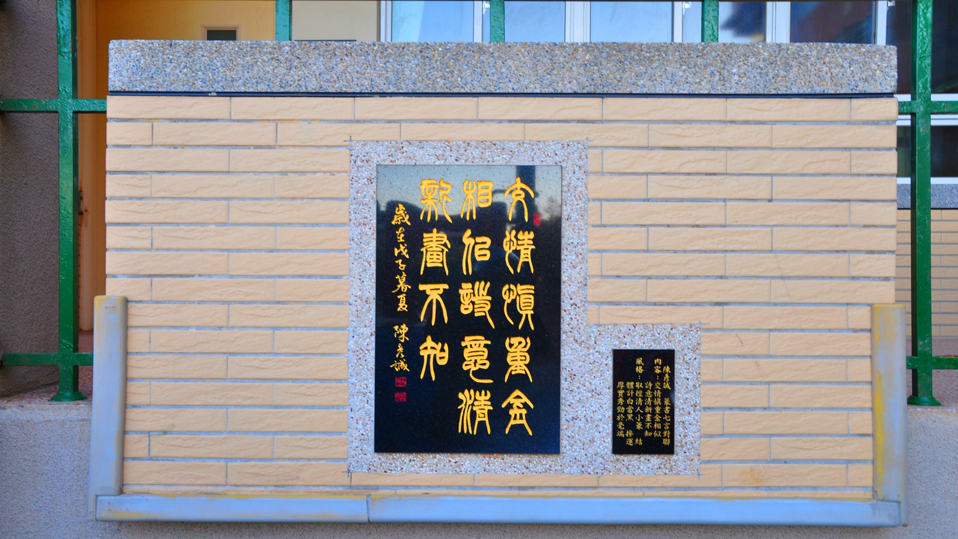 中文（台灣）: 湧昇樓下特有的傑出學生書法嵌飾。